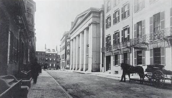 Boston, Massachusetts